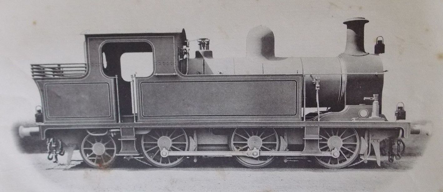 Oude and Rohilkund steam locomotive of 0-6-2 type